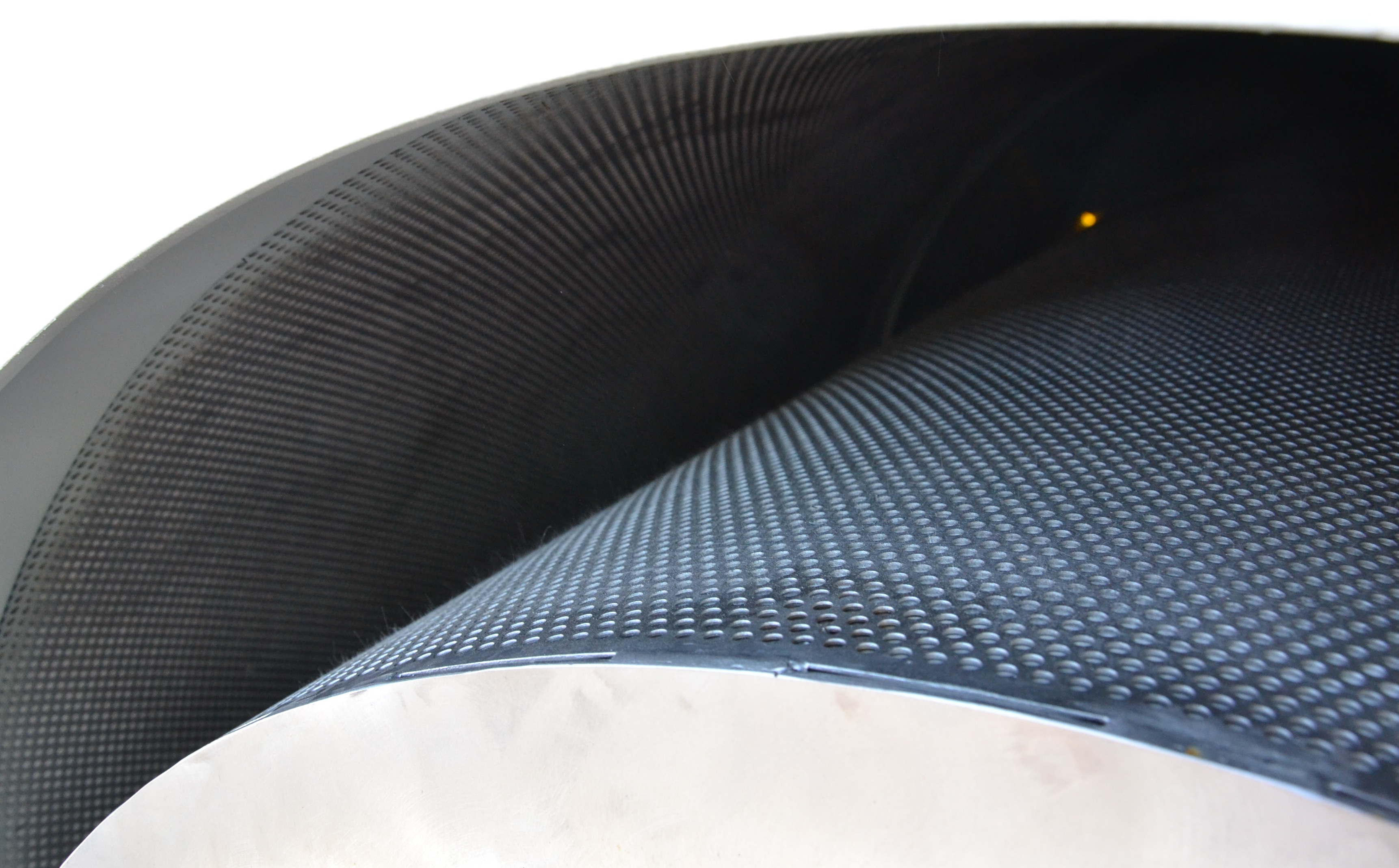 Detail des Ausblasschalldämpfers (Kulissenschalldämpfer) des Biomasseheizkraftwerkes Steyr